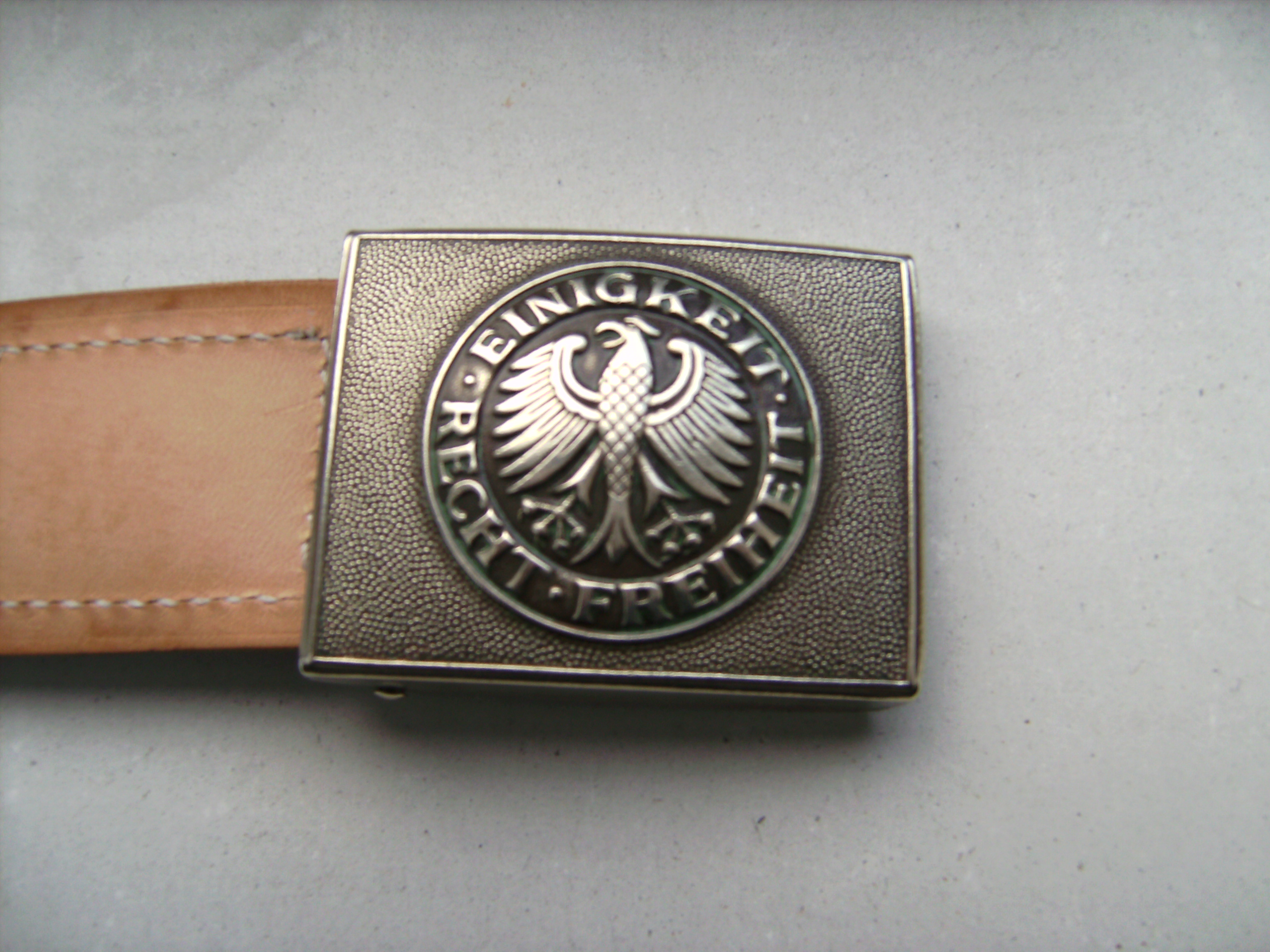 BW Koppel